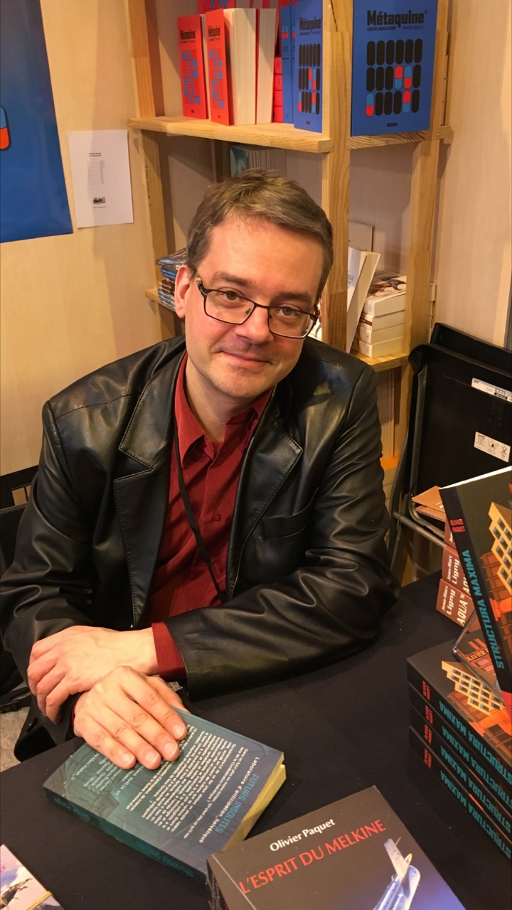 Photo prise au dernier Livre Paris sur le stand de l'Atalante